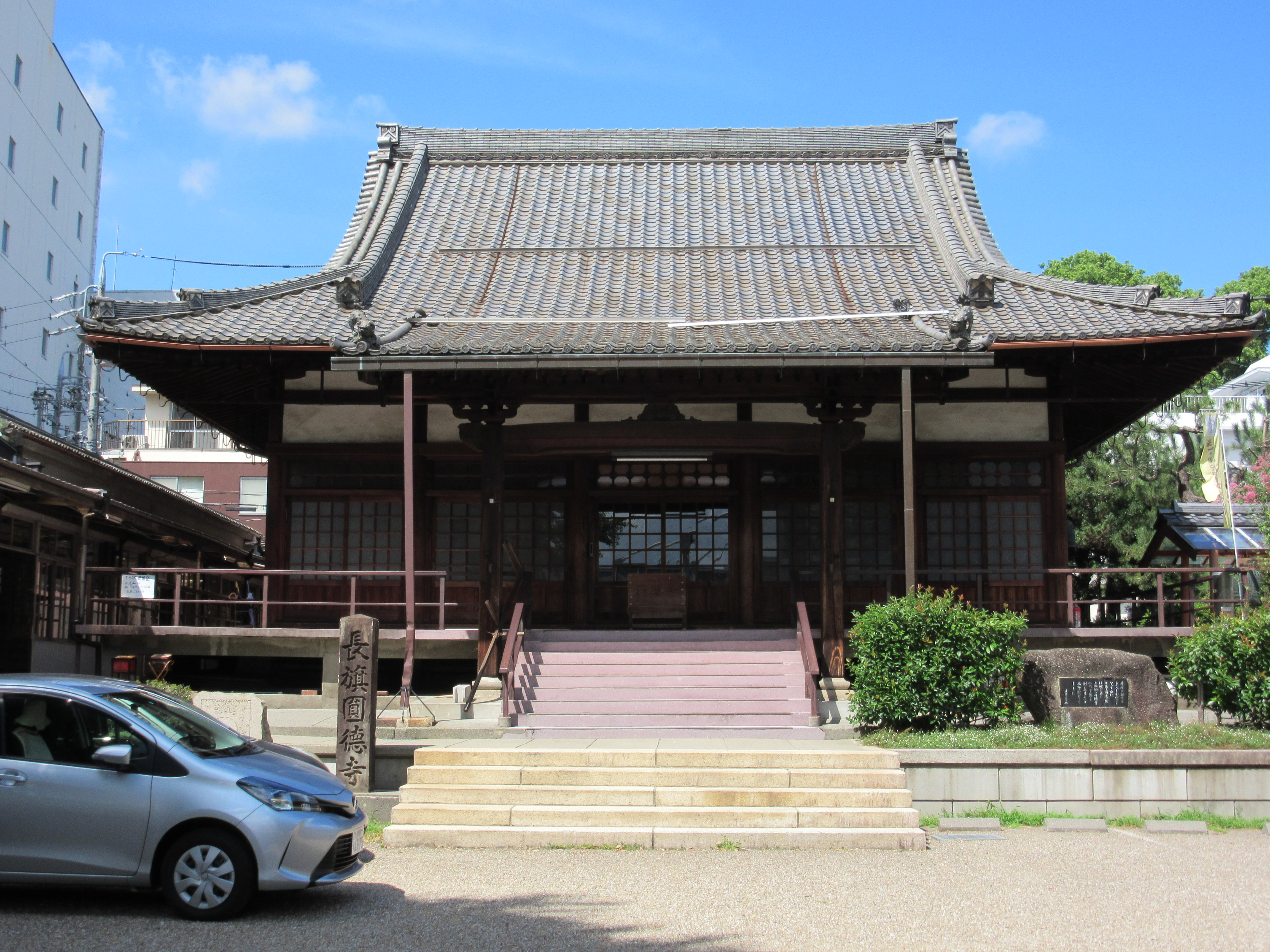 円徳寺(岐阜市)